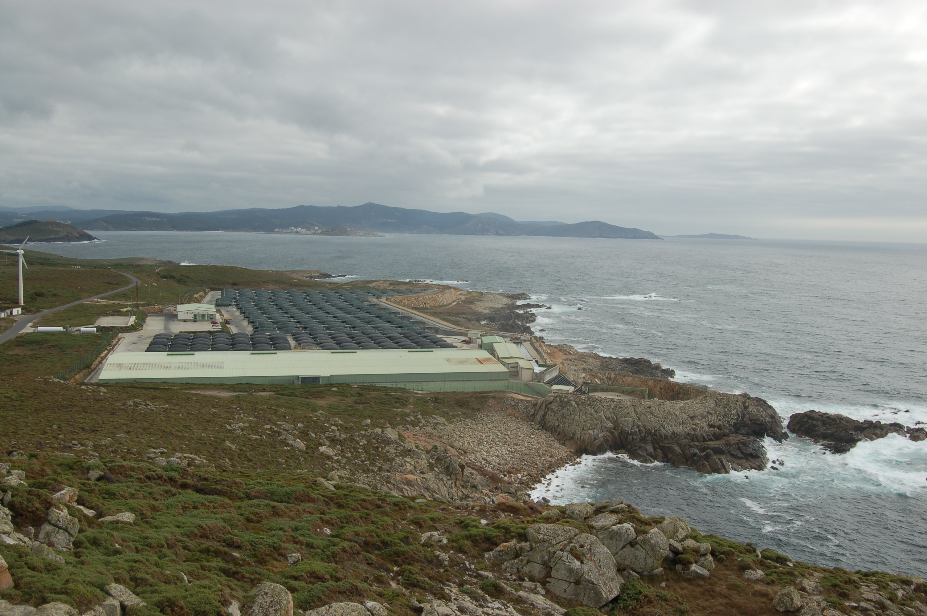 Piscifactoría de Stolt Sea Farm en cabo Vilán (Camariñas).